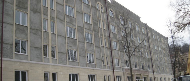 Շուշիի տեխնոլոգիական համալսարանի հանրակացարանը